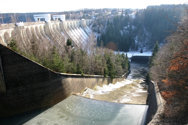 Weesertalspär Iwwerlaaf mat vue an d'Polterbecken